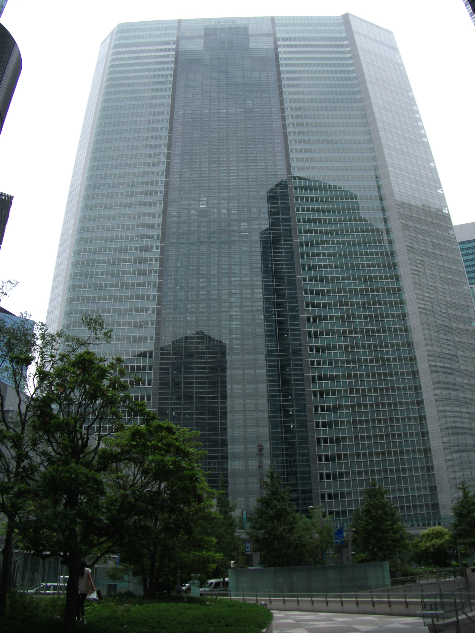 電通本社ビル、銀座側より